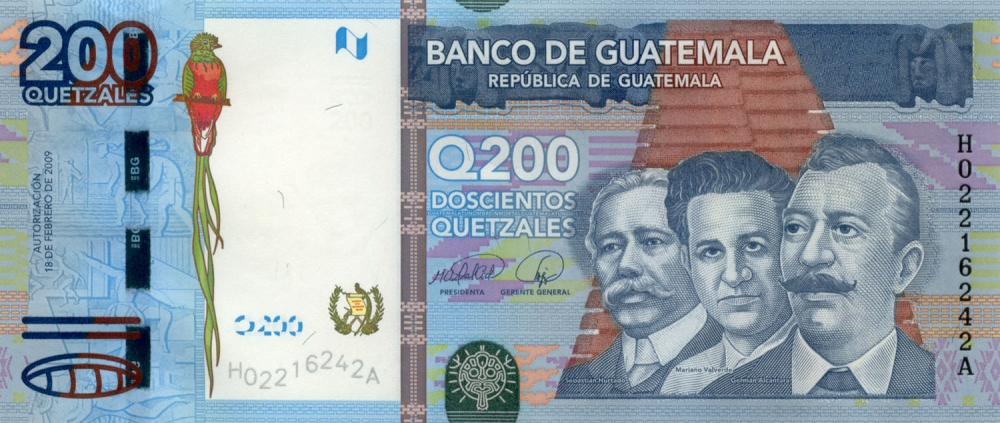 Billete de 200 Quetzales en Guatemala